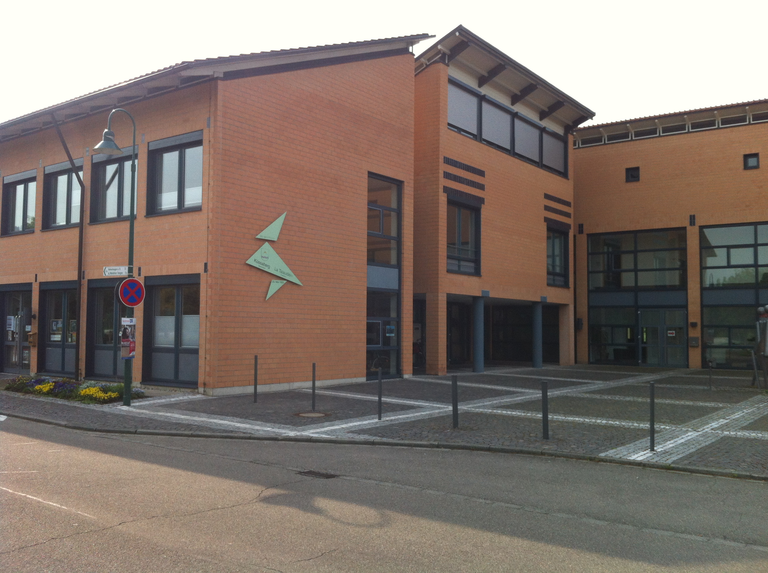 Küssaberg, Gemeinde im Landkreis Waldshut in Baden-Württemberg. Rathaus im Gemeindezentrum bei Rheinheim.